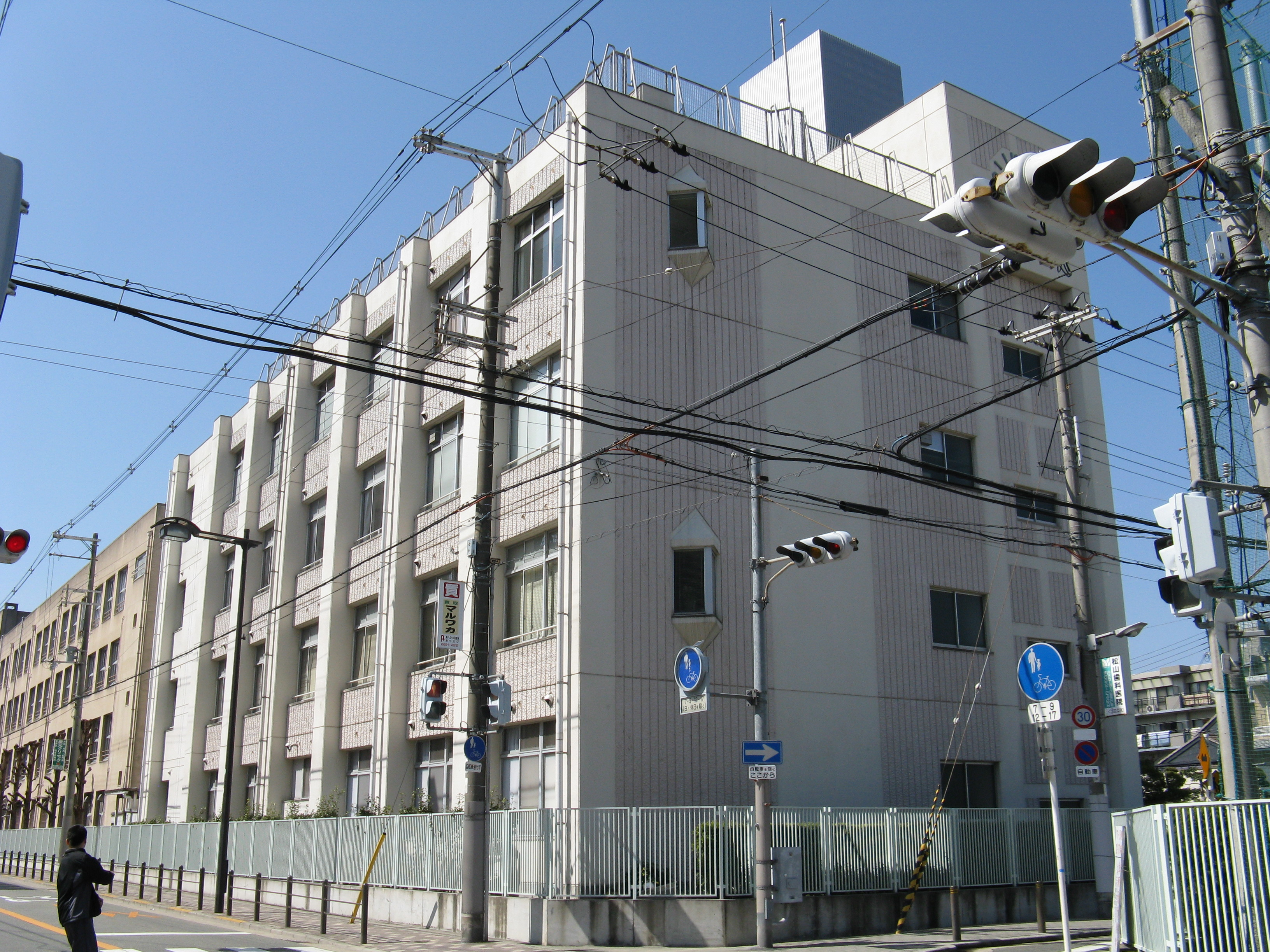 大阪市立田辺中学校